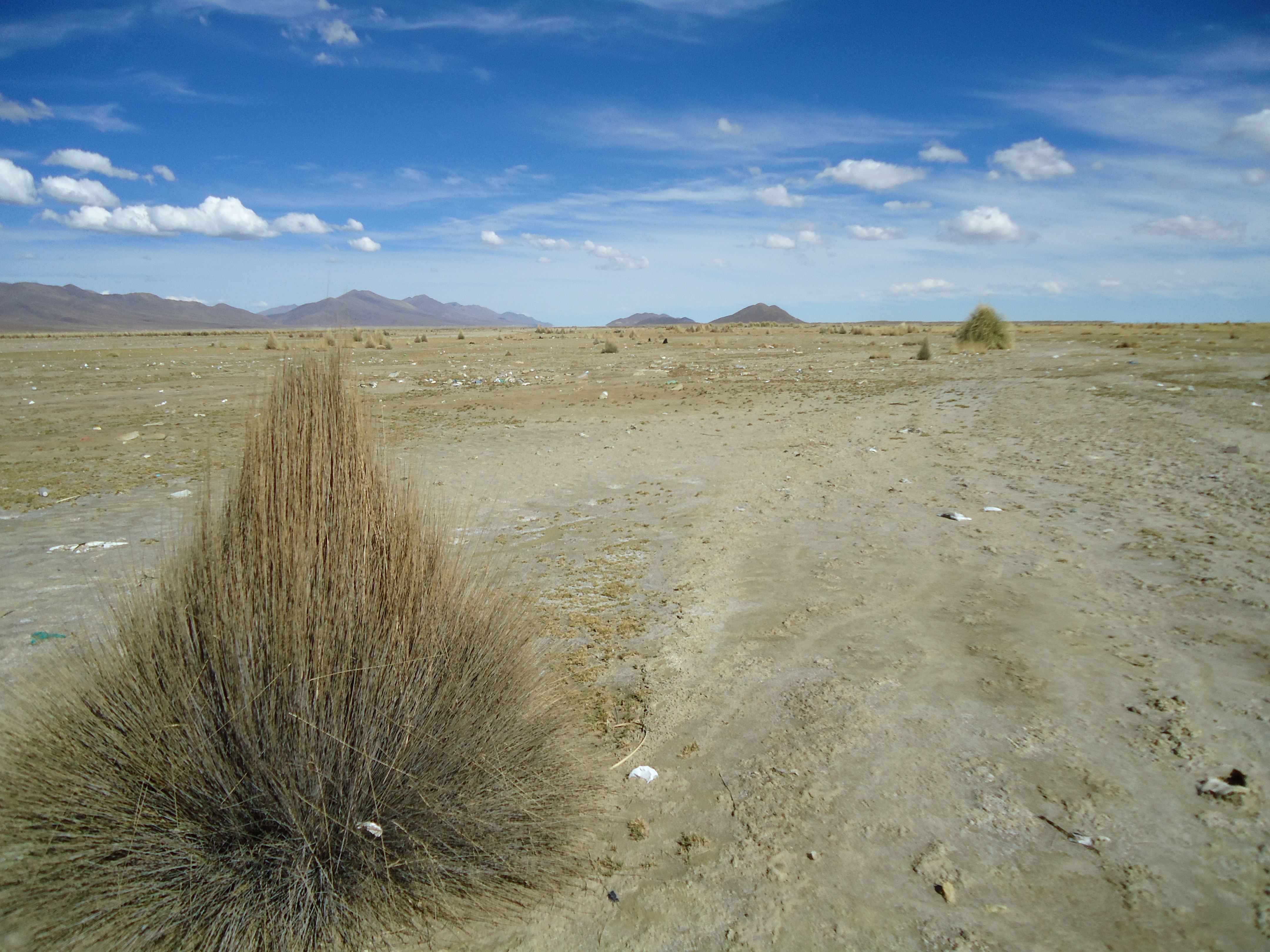 Especie vegetal muy caracteristica del altiplano boliviano, crece en zonas con temperaturas extremas, secas y a elevada altitud (3700 msnm).